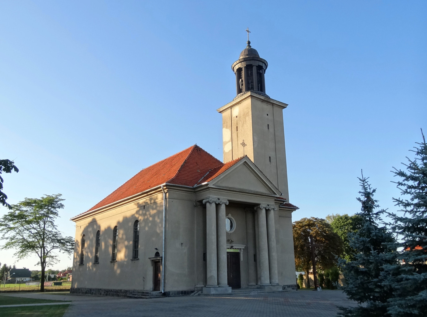 Kościół rzymskokatolicki parafialny pod wezwaniem Najświętszej Marii Panny Królowej Polski w Brzozie, gmina Nowa Wieś Wielka, powiat bydgoski, województwo kujawsko-pomorskie, diecezja bydgoska